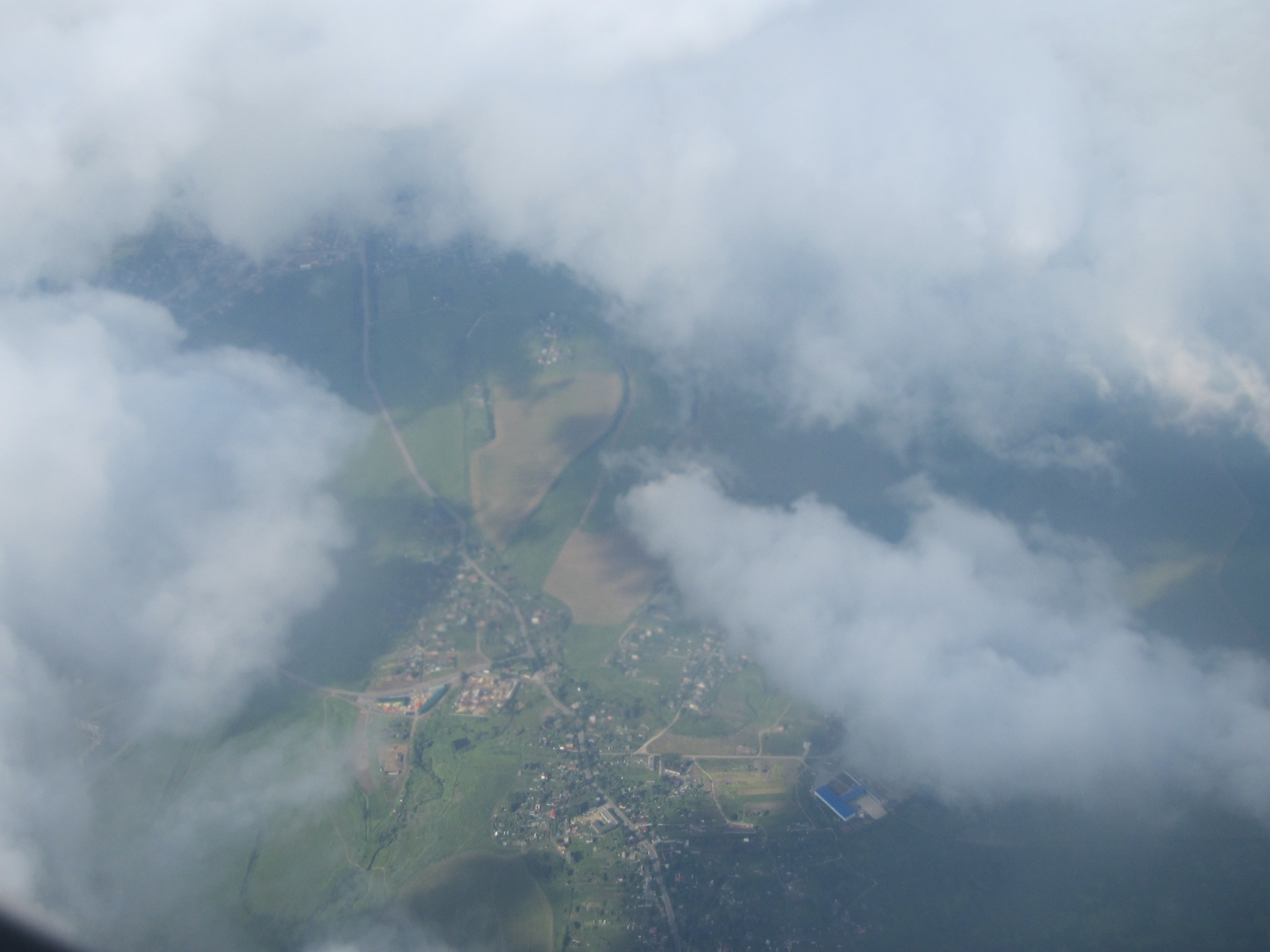 Гатчинский район Ленобласти. В центре - сёла Марьино и Порицы, что к югу от Павловска . Рейс Санкт-Петербург - Сочи (09:30 - 12:14) авиакомпании "Россия".